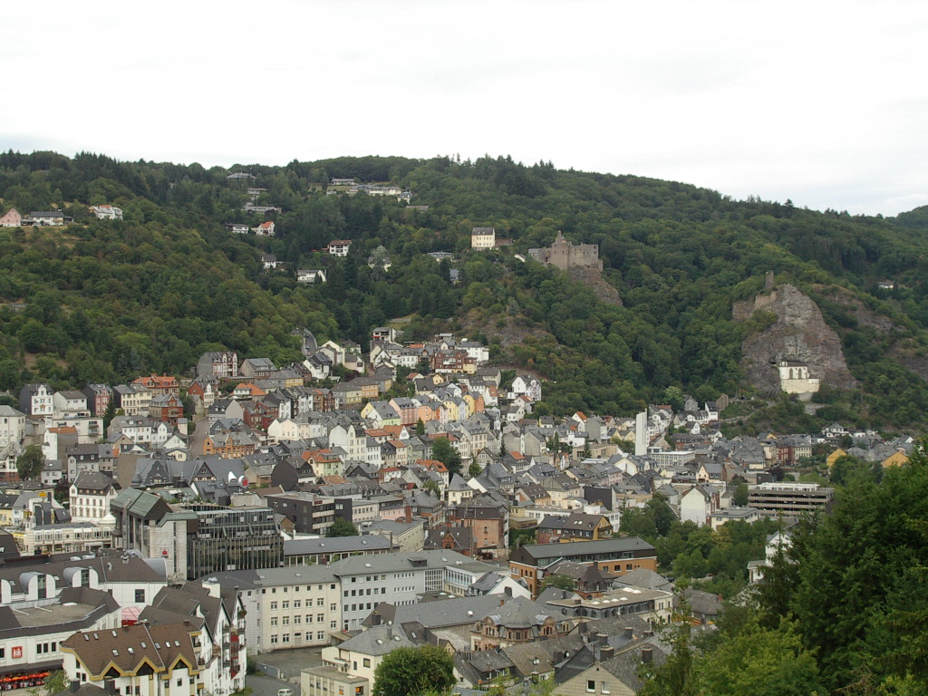 Stadtpanorama von Idar-Oberstein, Stadtteil Oberstein mit Schloss Oberstein, Burgruine Bosselstein und Felsenkirche.